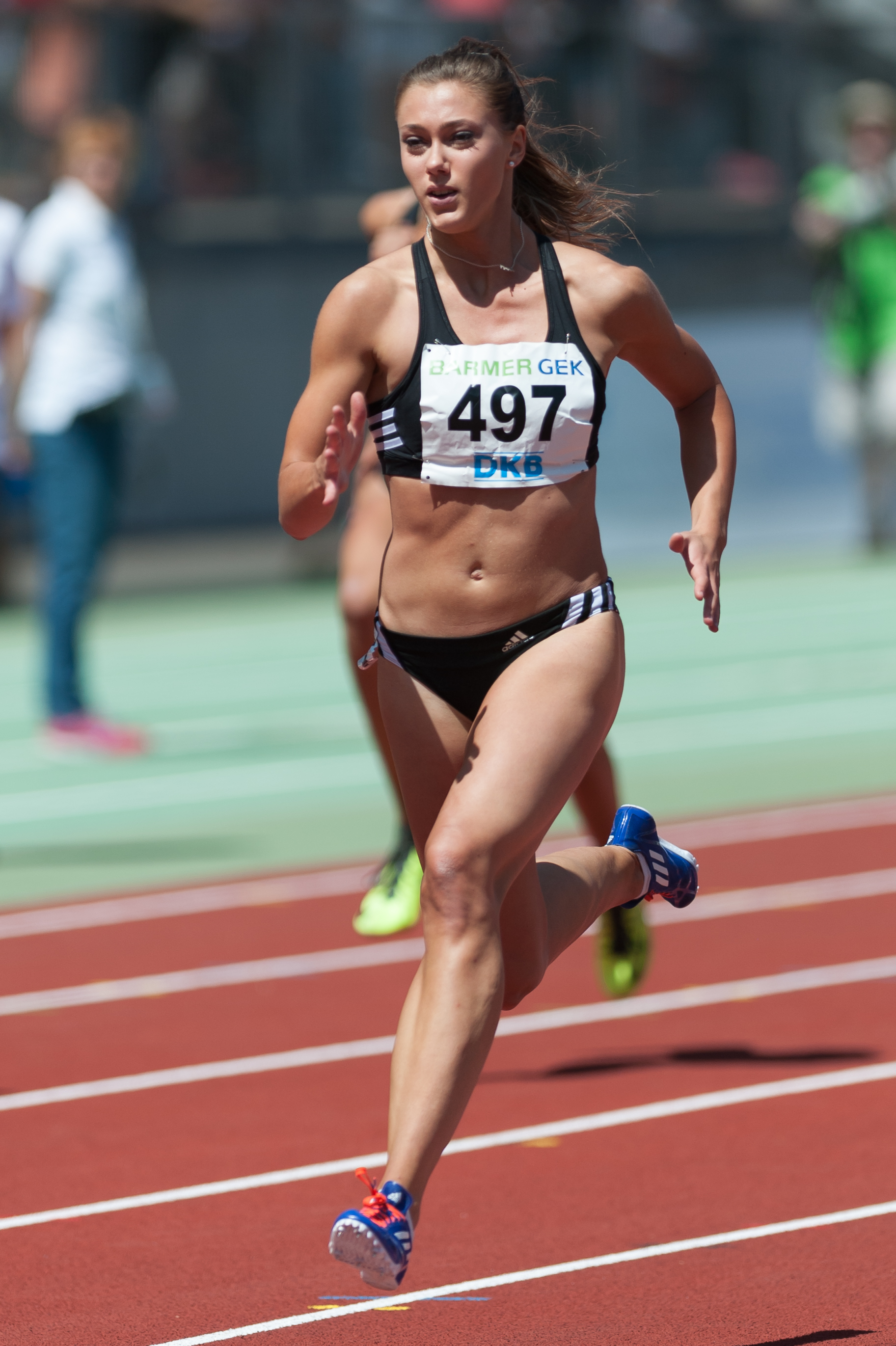 Deutsche Leichtathletik-Meisterschaften 2015: Frauen 200m - Anna-Lena Freese, FTSV Jahn Brinkum